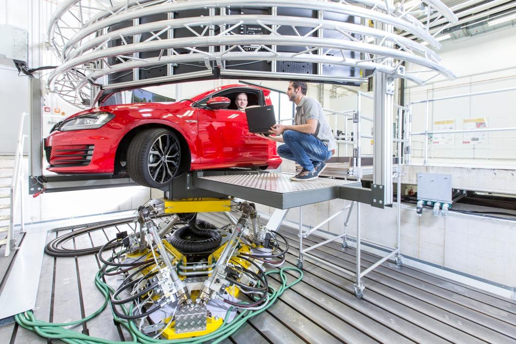 Ansicht NFF-Forschungsneubau in Braunschweig